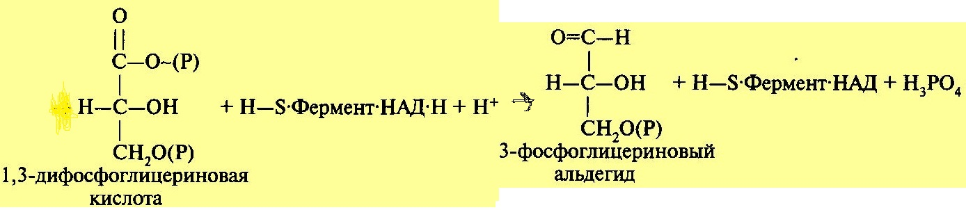 1,3 дифосфоглицериновая кислота в 3-фосфоглицериновый альдегид